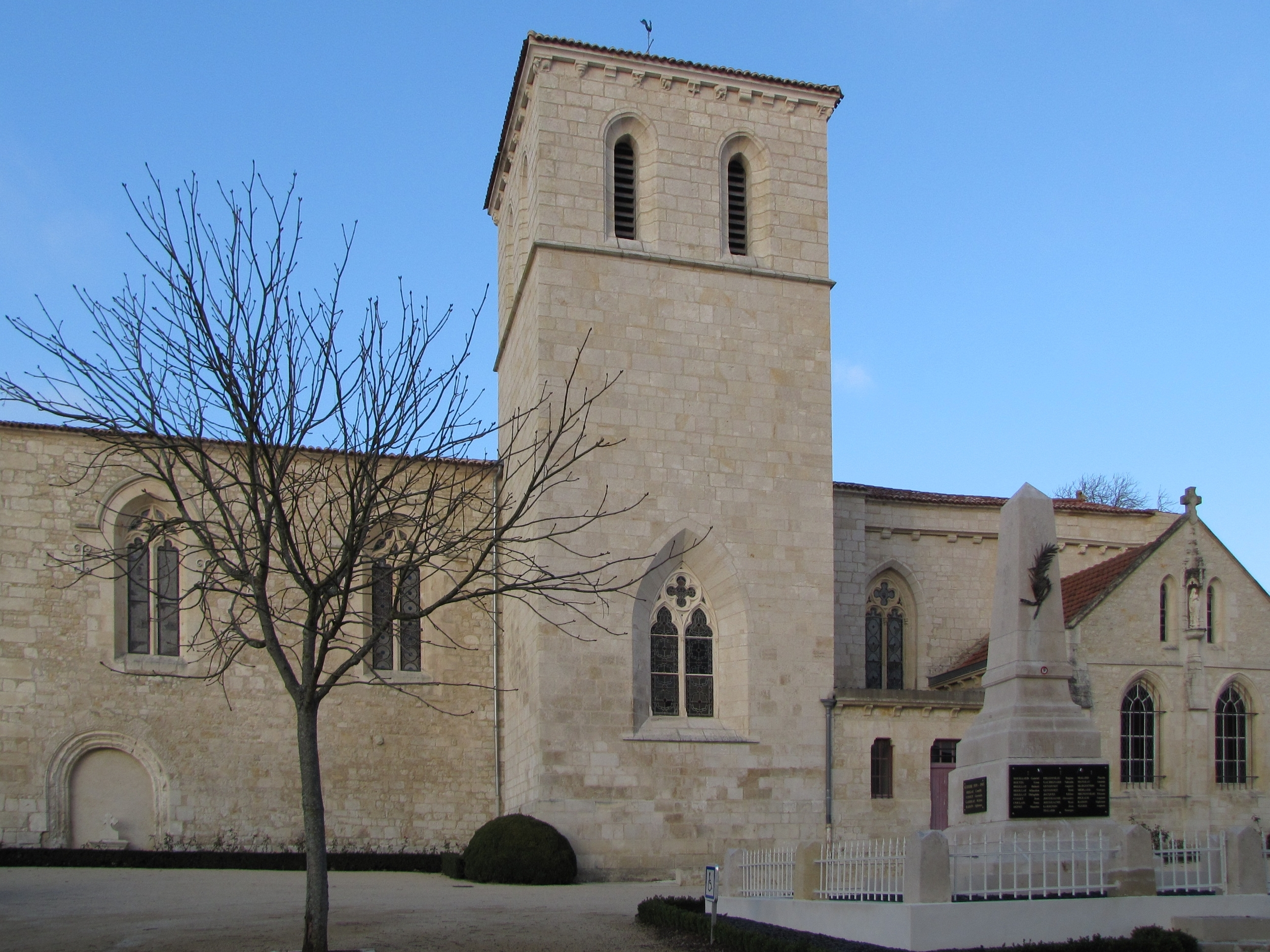 Prieuré d'Auzay